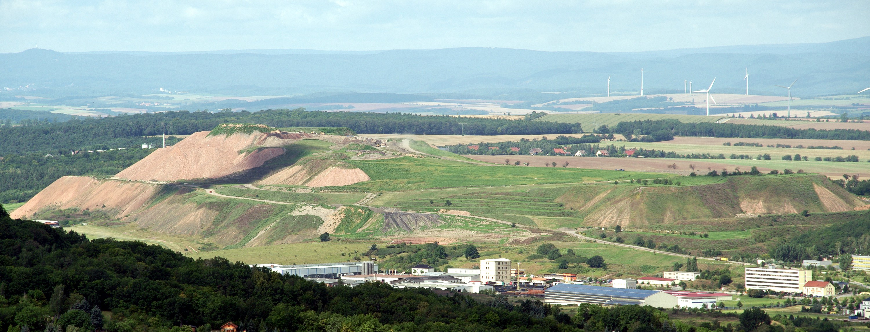 Die Kali-Rückstandshalde bei Sondershausen.